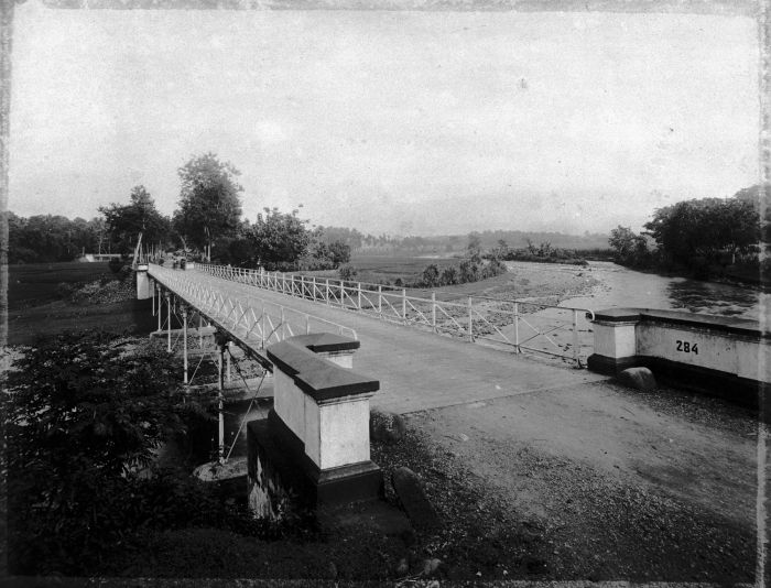 Foto. De brug over de Logawa rivier met daarachter de brug over de Mengadji rivier.